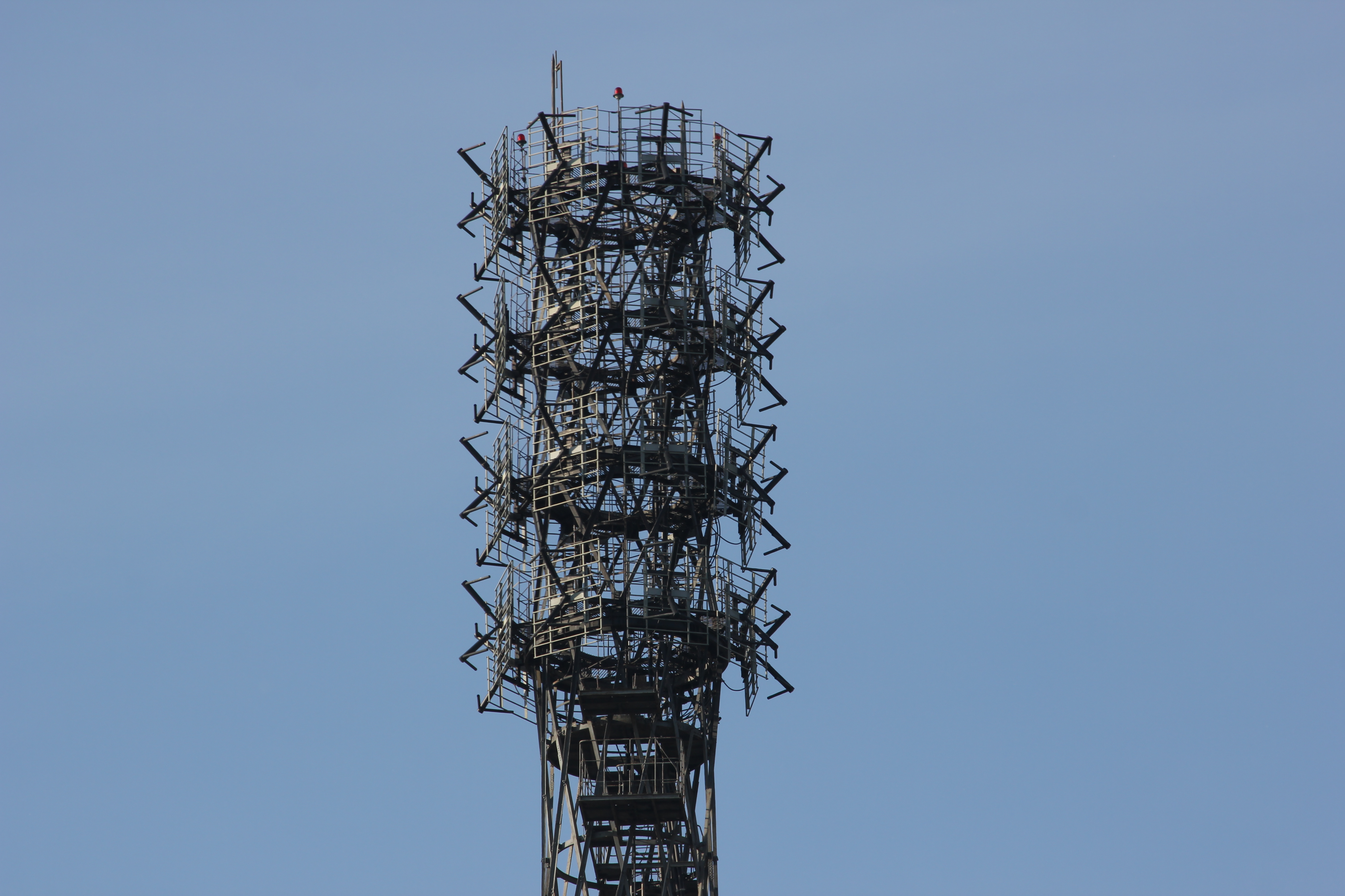 Радио-башня: Донской, Южный округ, Москва